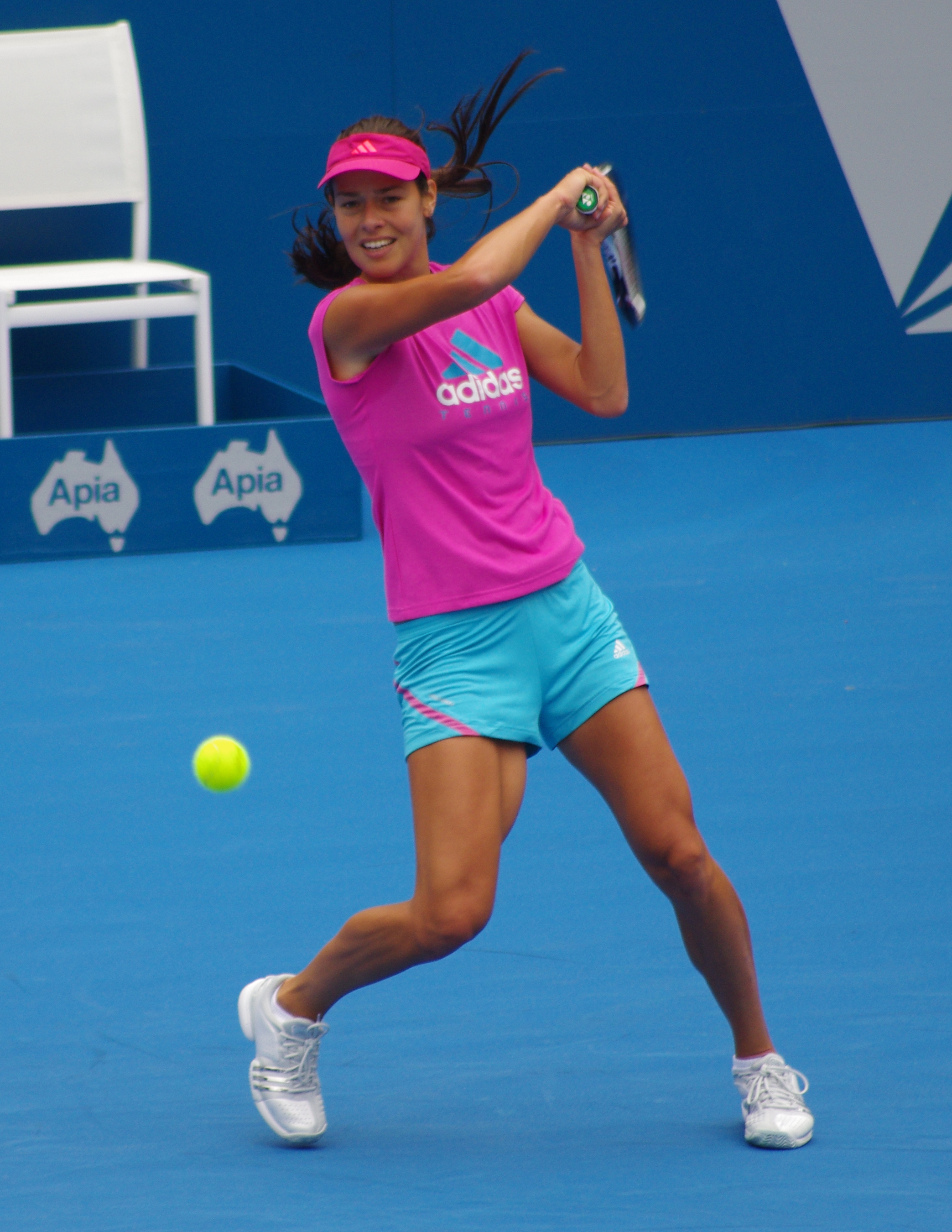 Ana ivanovic